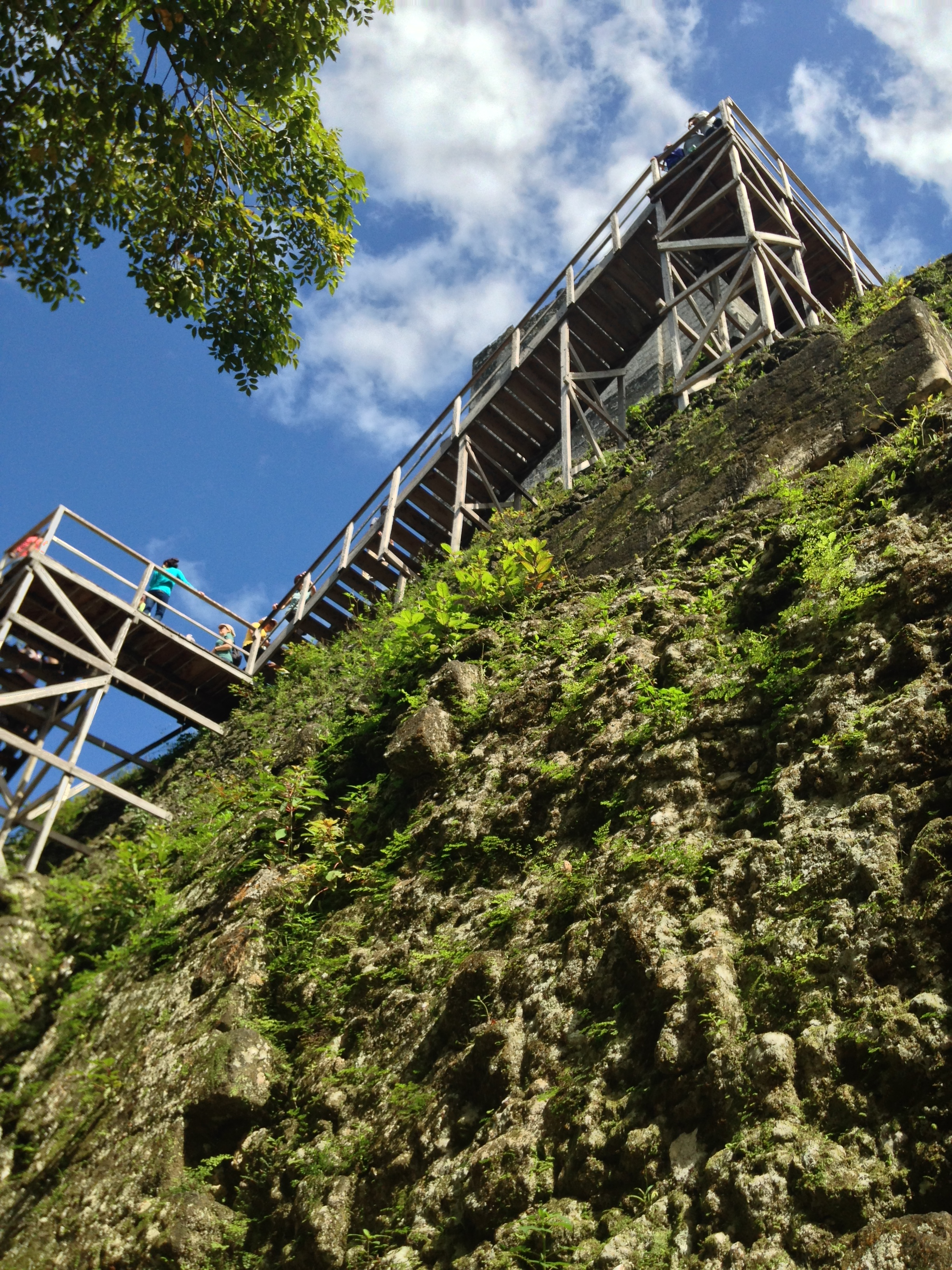 Templo II del Parque Nacional Tikal en Guatemala. Diciembre de 2015.